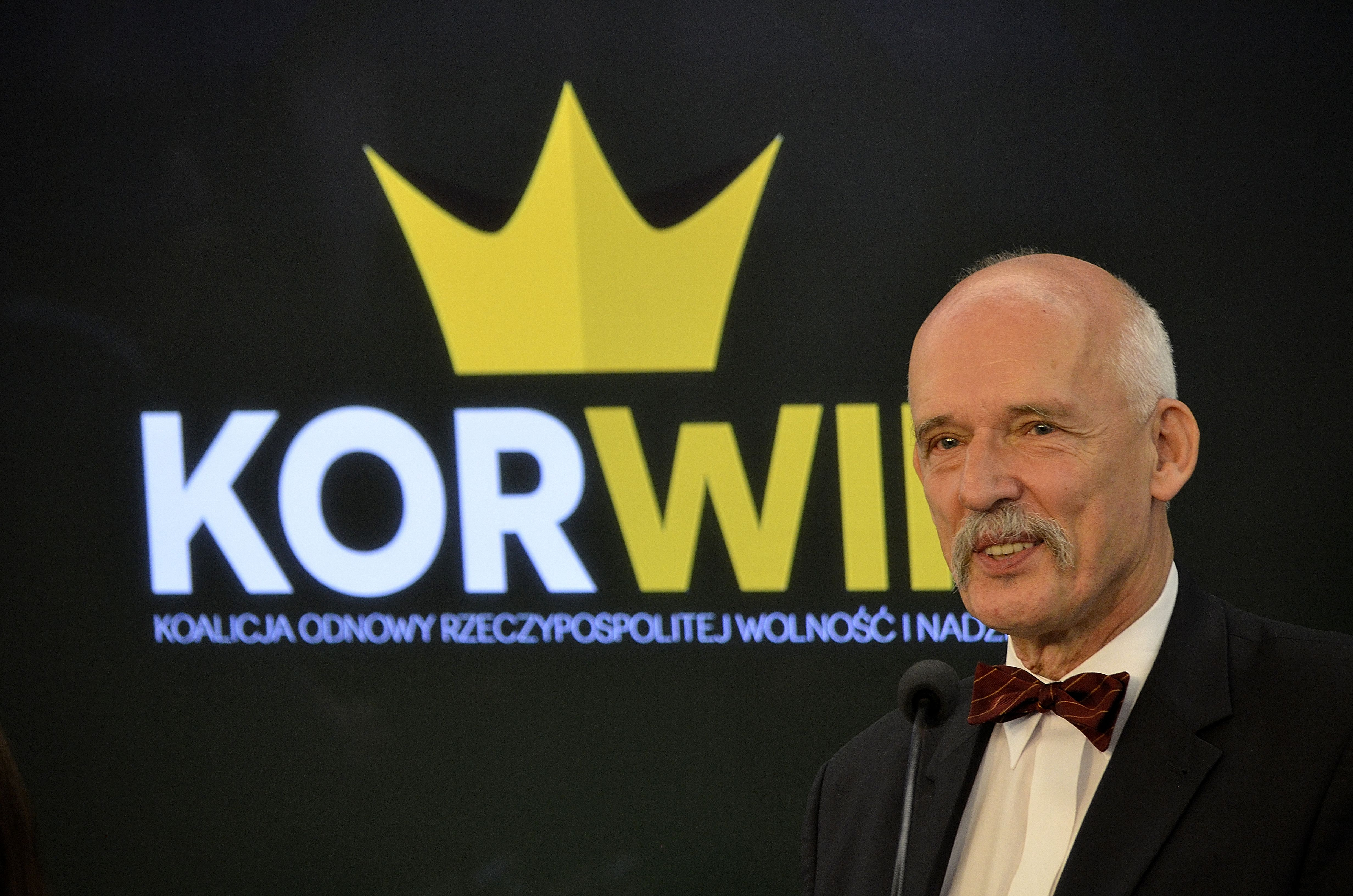 Poseł do PE Janusz Korwin-Mikke w Sejmie